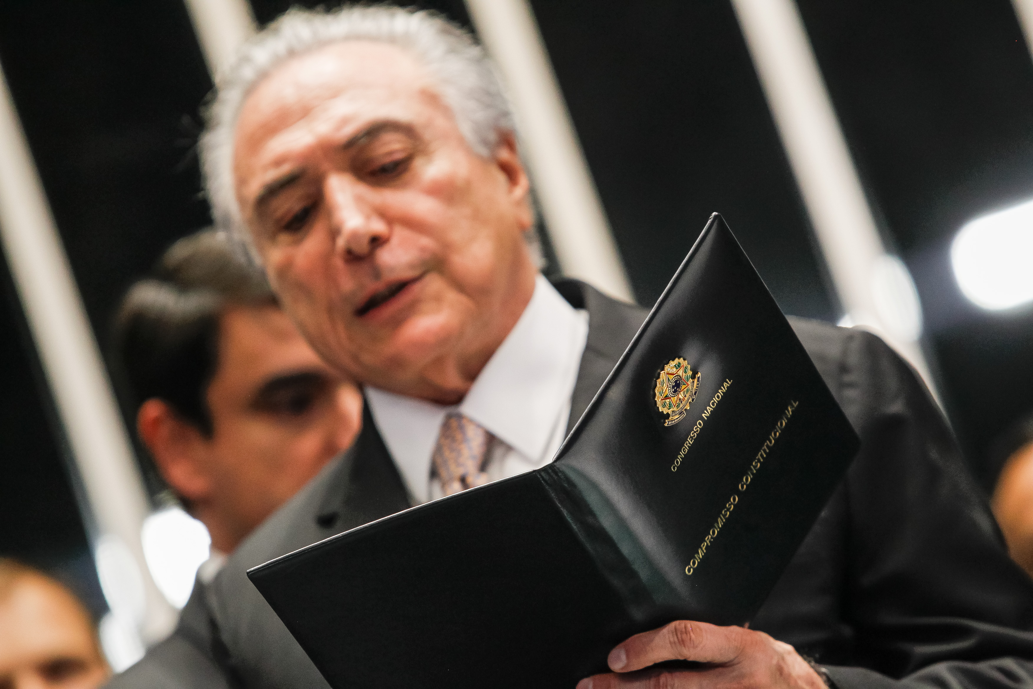 Posse de Michel Temer como Presidente da República no Senado Federal